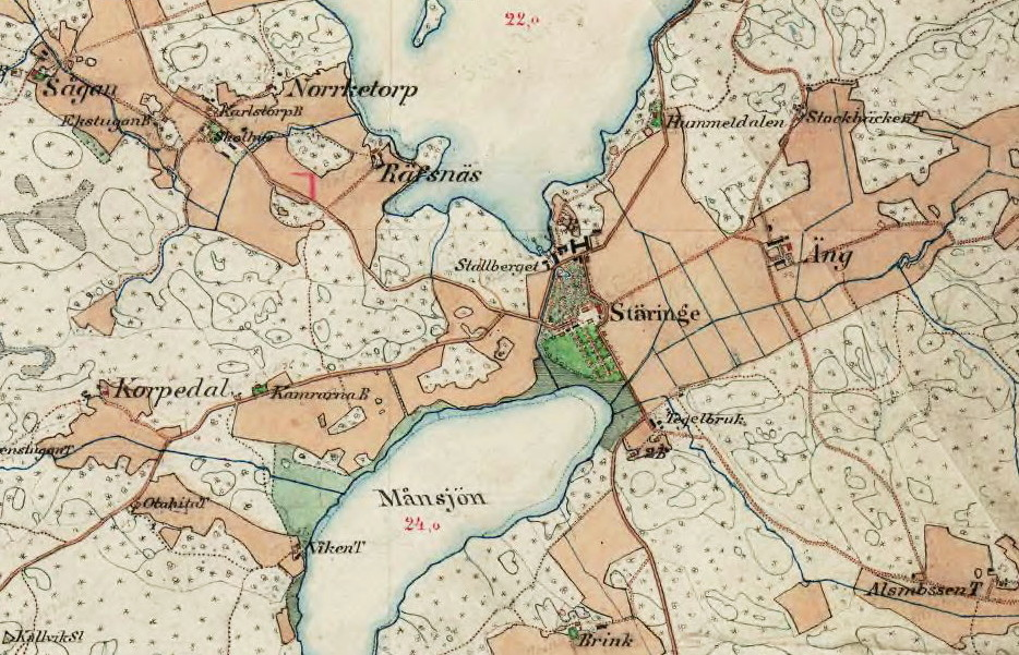 Stäringe herrgård på Häradsekonomiska kartan